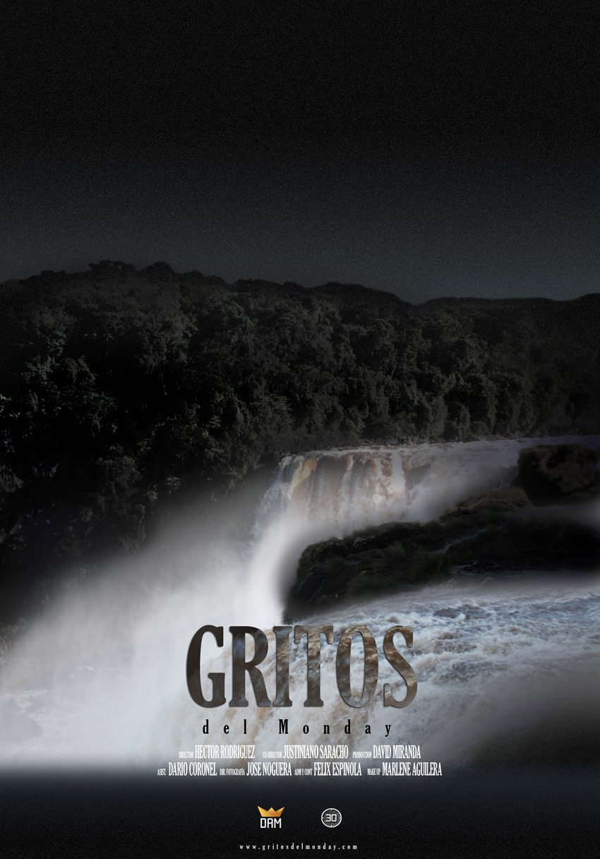 Este filme de terror paraguayo es el primero en su genero y ciertamente es un factor de novedad que juega a su favor, especialmente porque va acompañado de un buen trabajo de márketing hecho por la productora DAM.